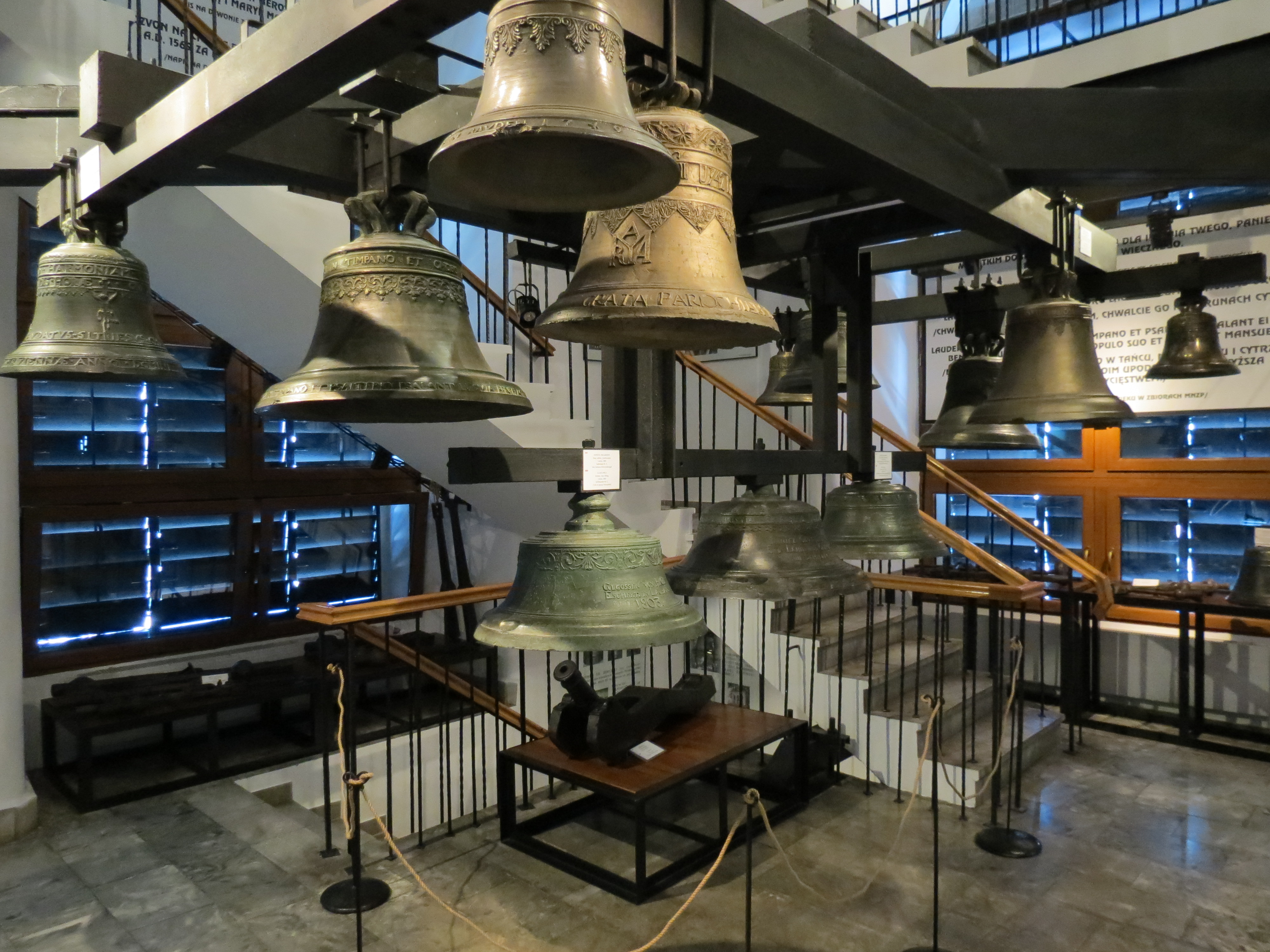 Przemyśl, wieża cerkiewna, tzw. Zegarowa, 1775-1777